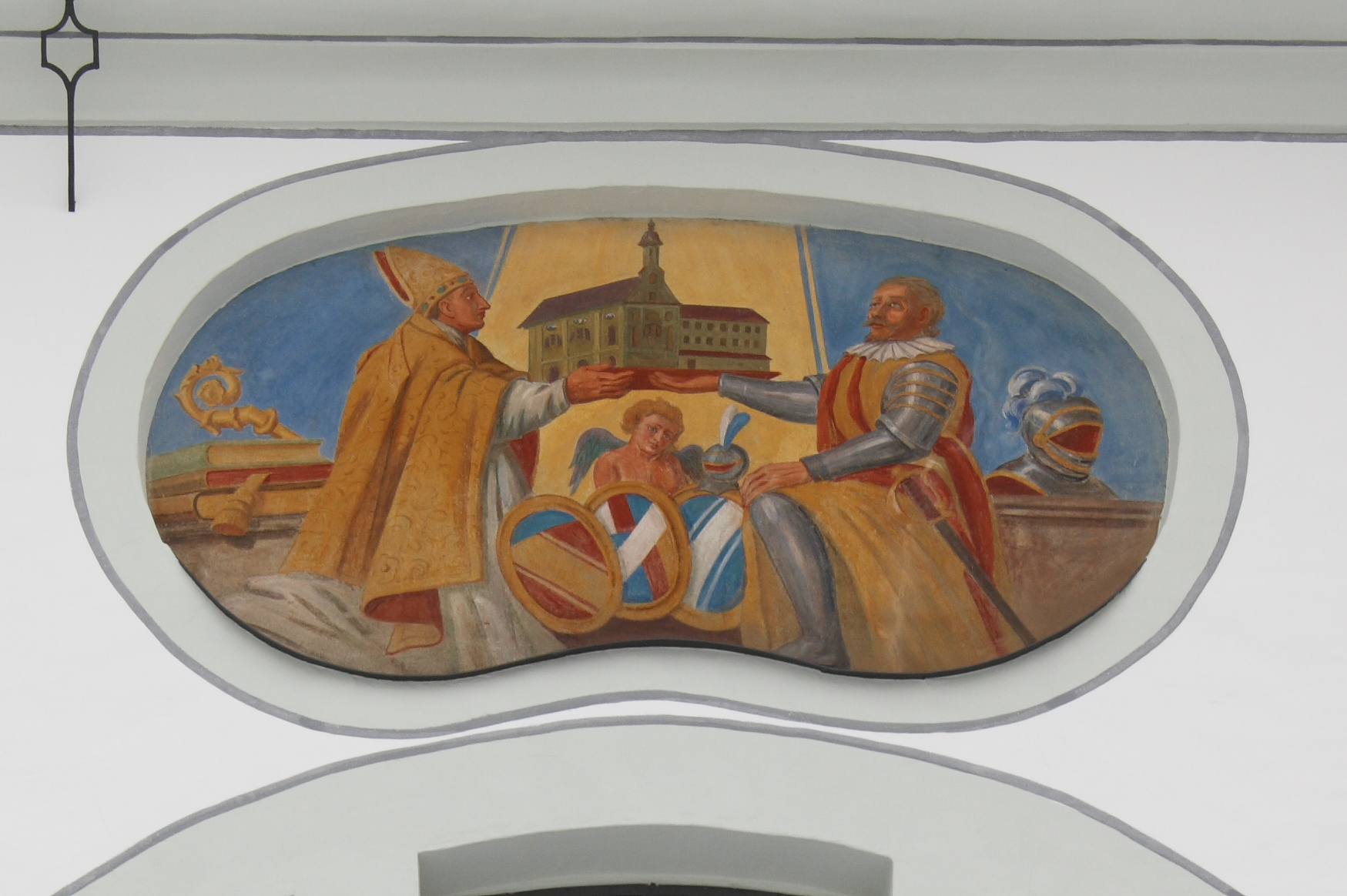 Klosterkirche Mariä Himmelfahrt (Dillingen an der Donau) der Dillinger Franziskanerinnen in Dillingen an der Donau (Bayern), mittleres Fresko an der westlichen Außenwand mit der Darstellung des Grafen Hartmann IV. von Dillingen und seines Sohnes Hartmann V., Bischof von Augsburg, die Stifter des Klosters, mit Wappen